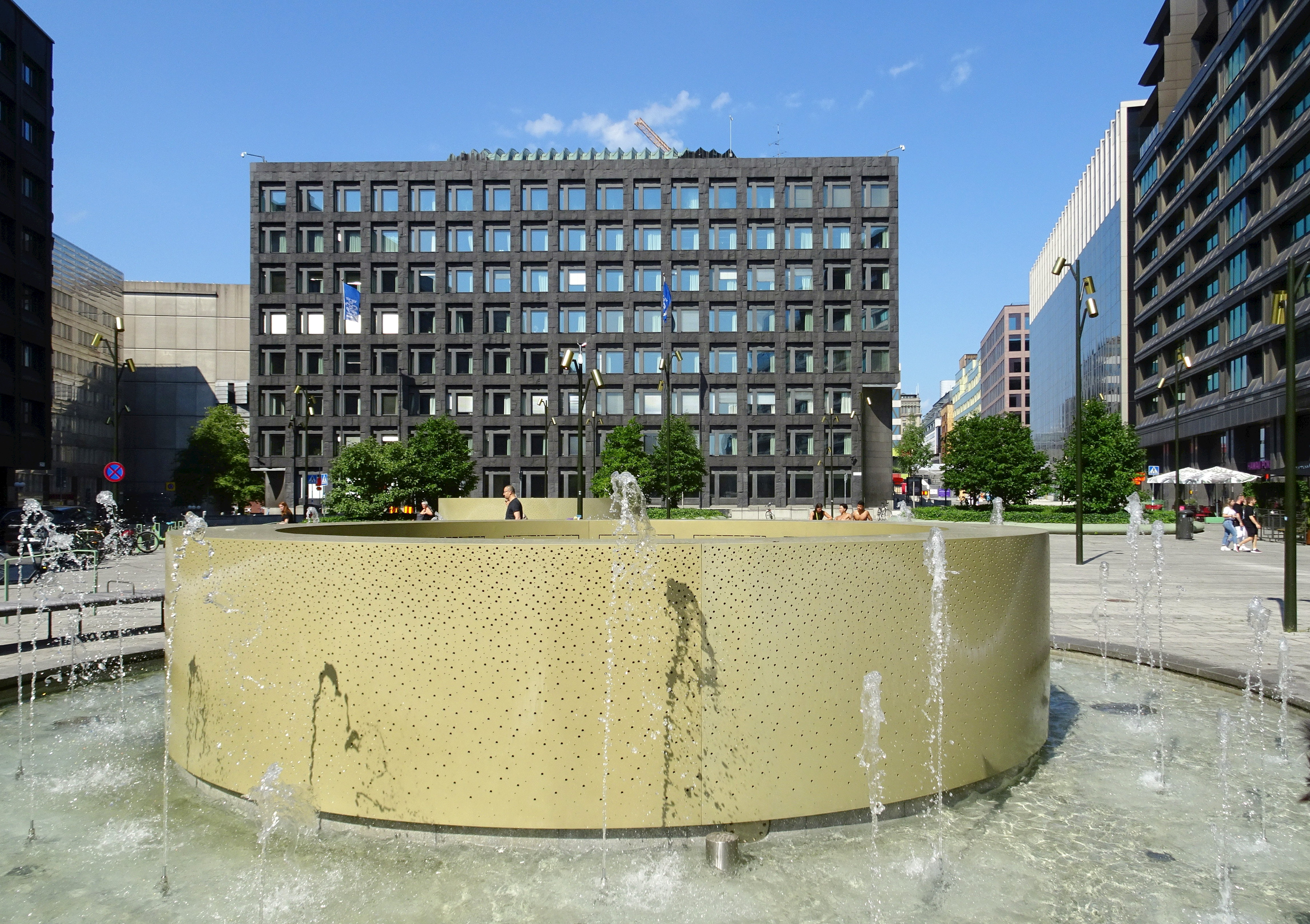 Nya fontänerna på Brunkebergstorg